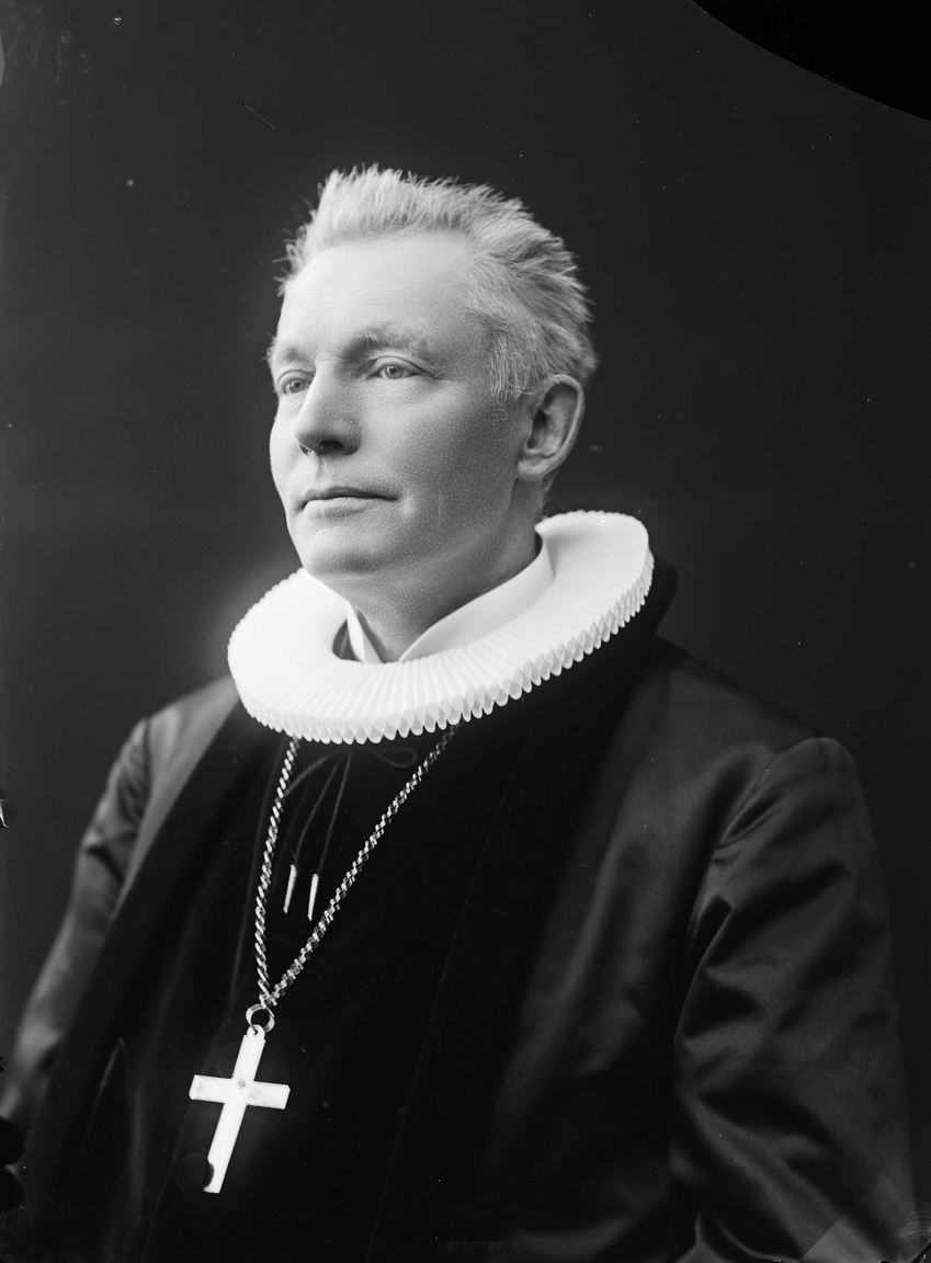 Jens Frølich Tandberg (1852–1922), biskop i Oslo bispedømme fra 1912 til 1922.